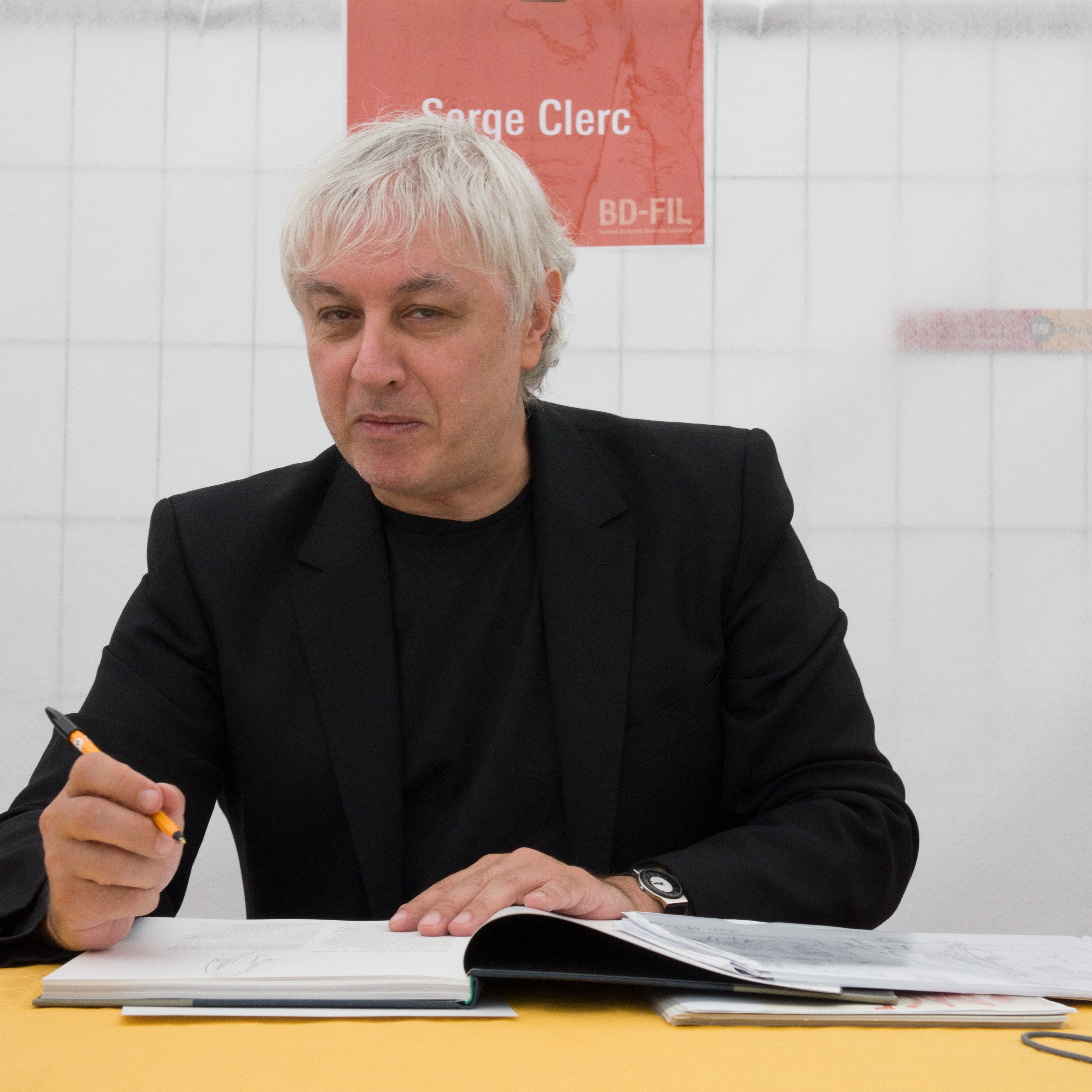 BD-FIL 2012